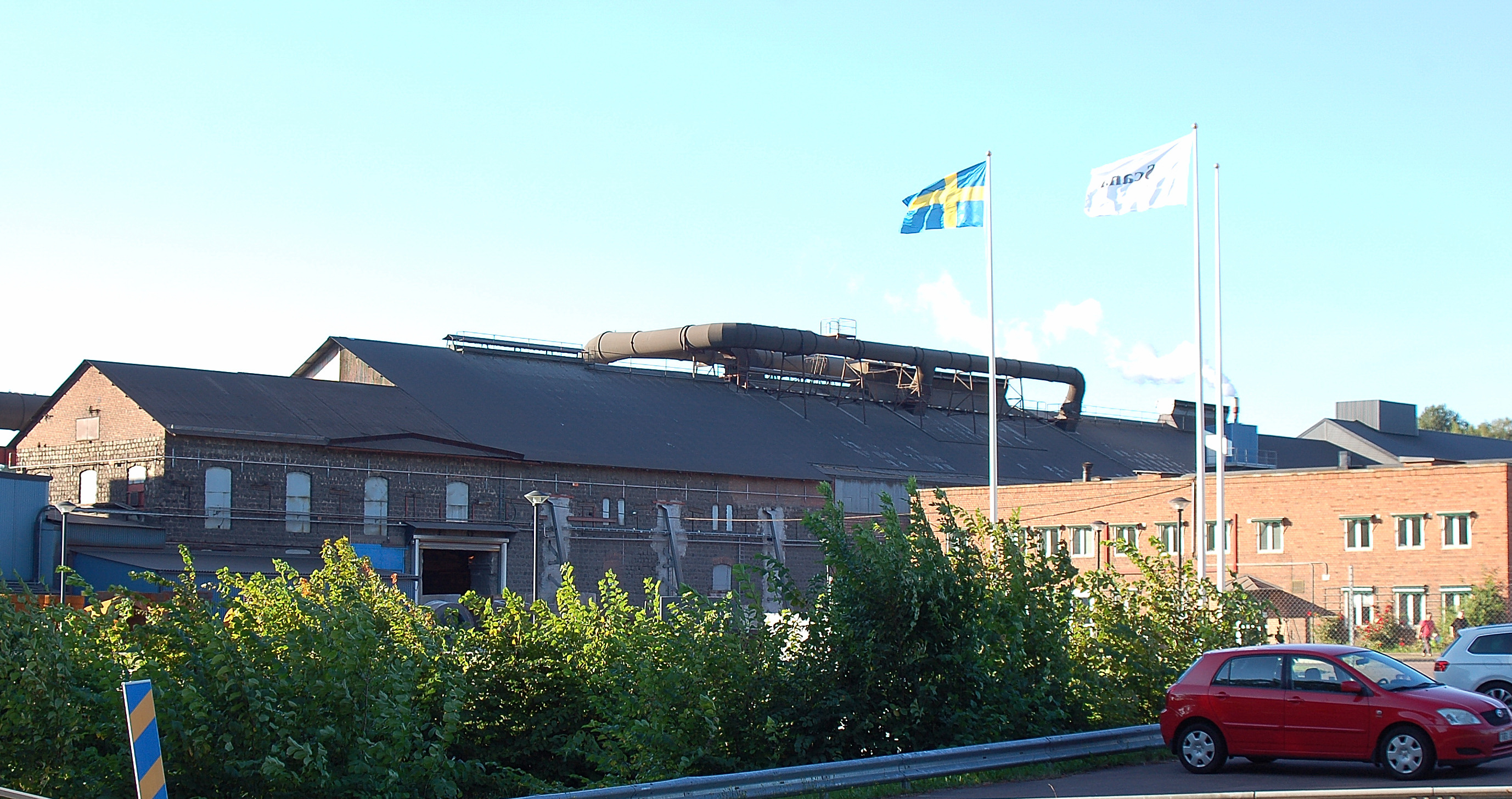 Scana Steel (Björneborgs Jernverk).